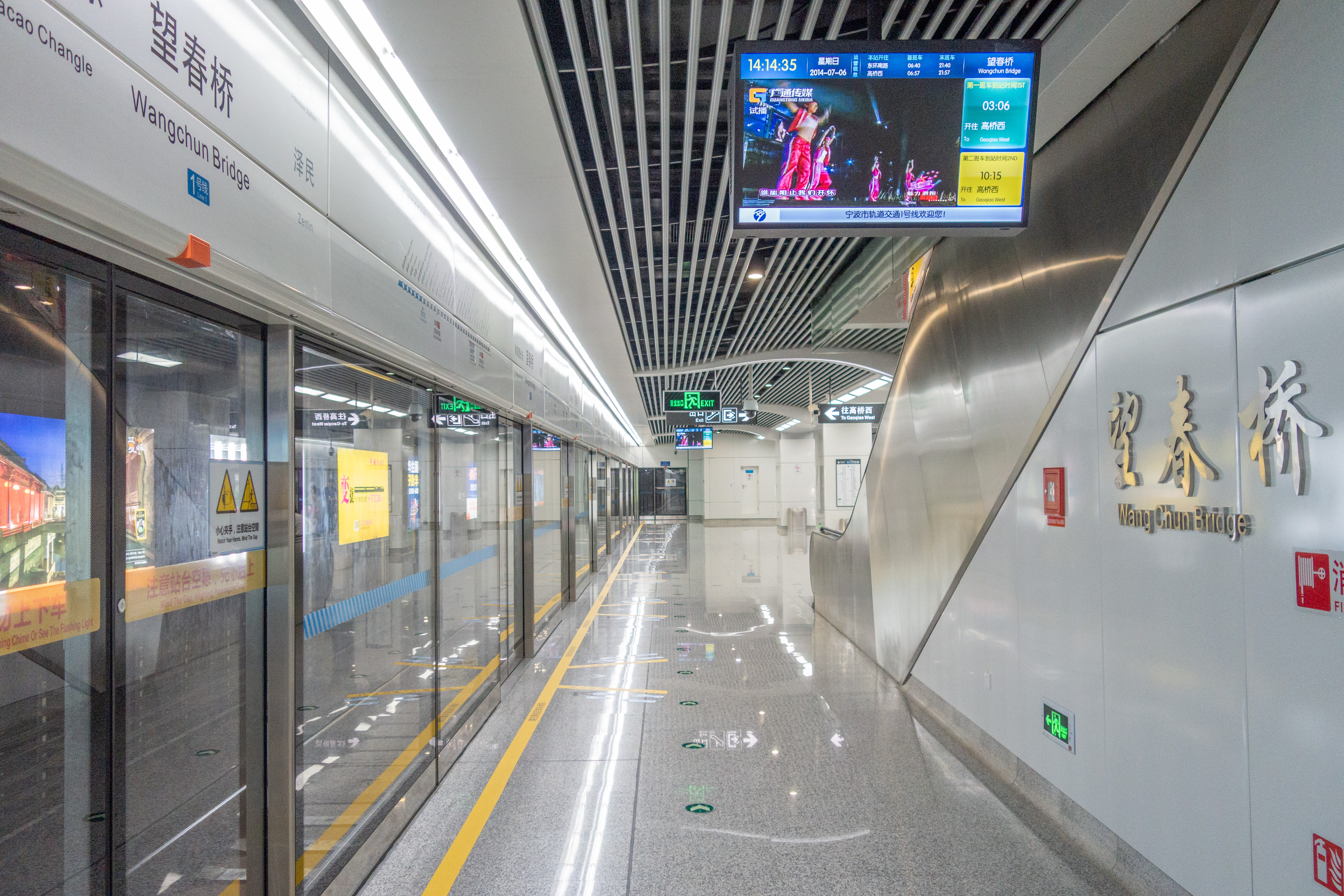 望春桥站站台